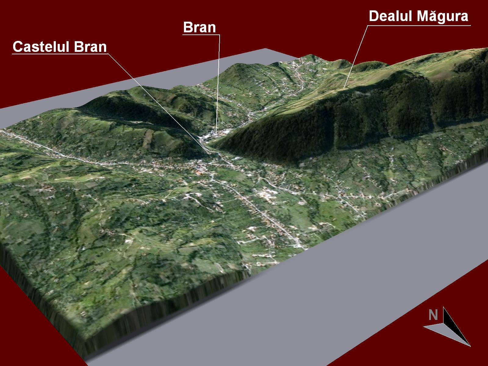 Prelucrare 3D al reliefului pentru localitatea Bran, Romania. Imagine realizata cu date SRTM preluate de la NASA si textura World Imagery.